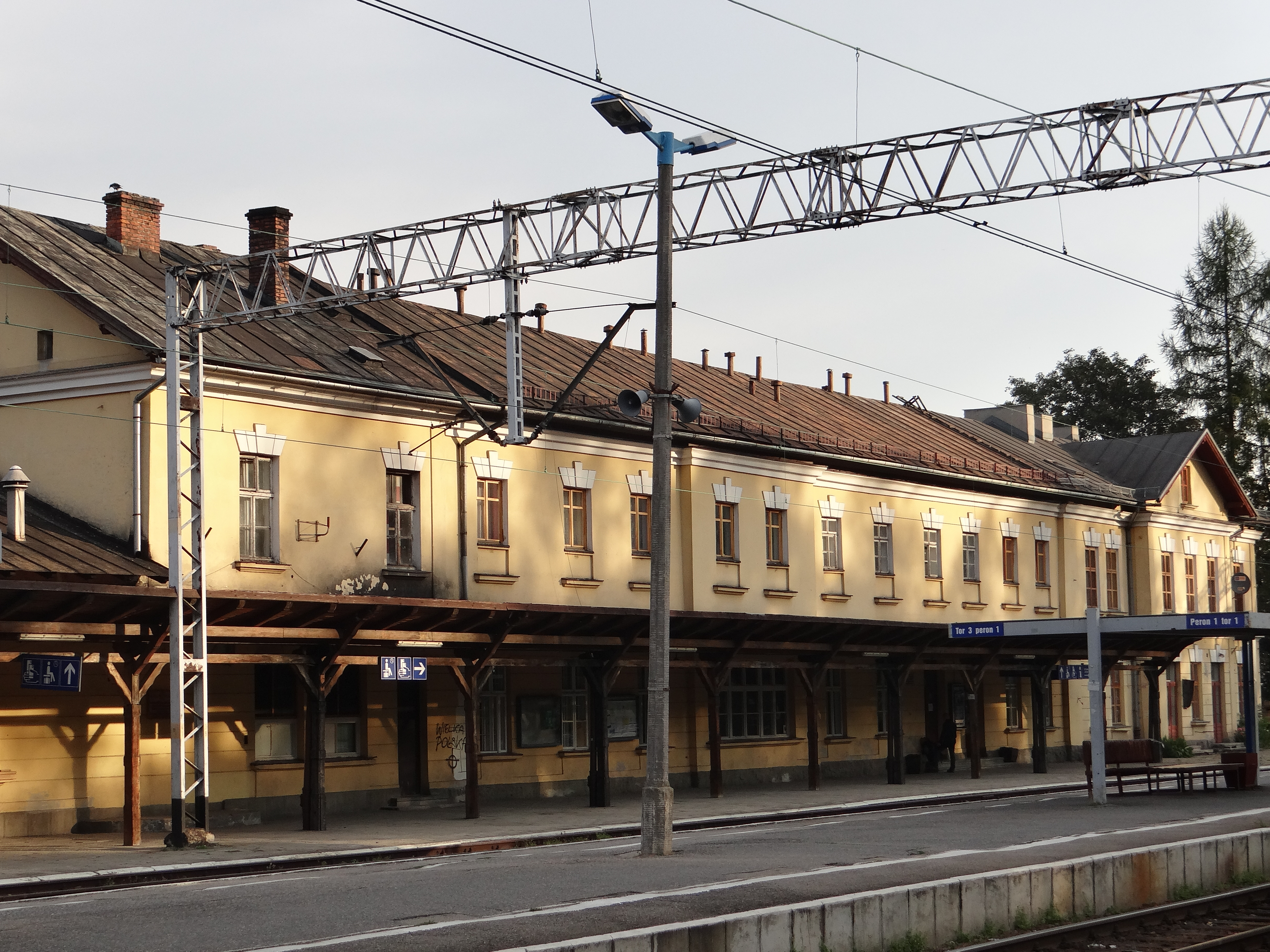 Zakopane, ul. Chramcówki 35 i 35a - dworzec kolejowy (zabytek nr A-1101/M i A-698 z 07.06.1993)